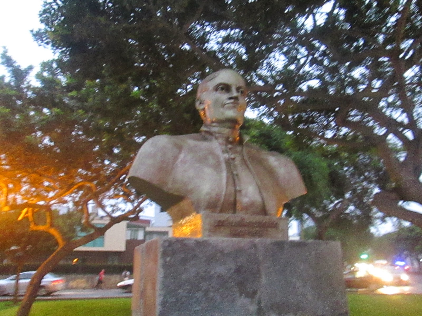 Busto de Jose Matias Delgado en Lima, Peru